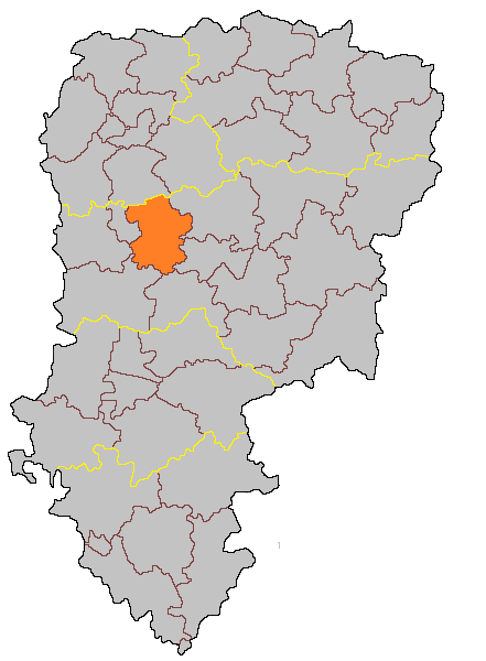 Кантон Ла-Фер на карте департамента Эна